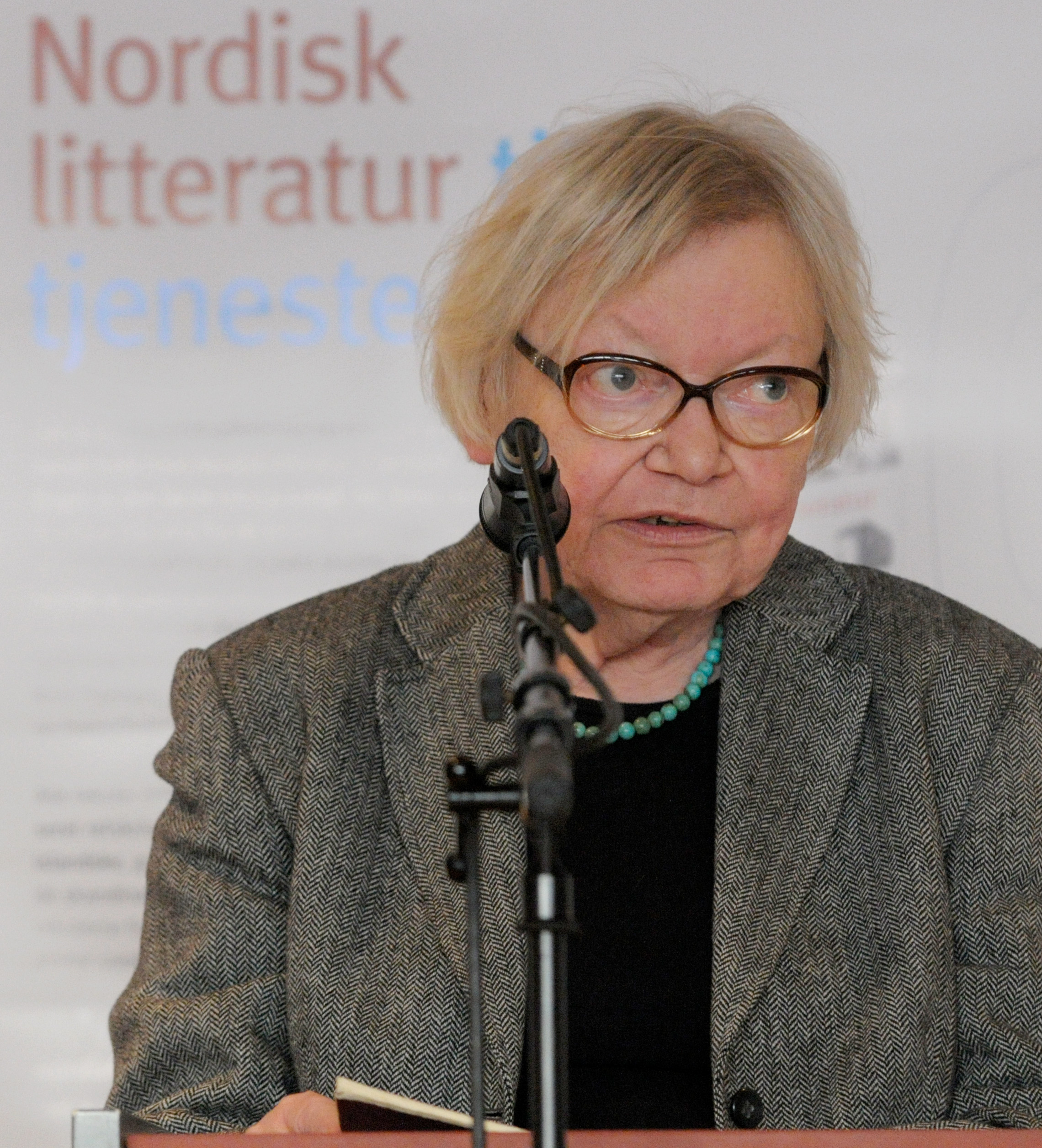 Inger Christensen läser ur ett av sina verk vid lanseringen av Nordisk litteratur til tjeneste på Sorte diamant i Köpenhamn 2008-03-05